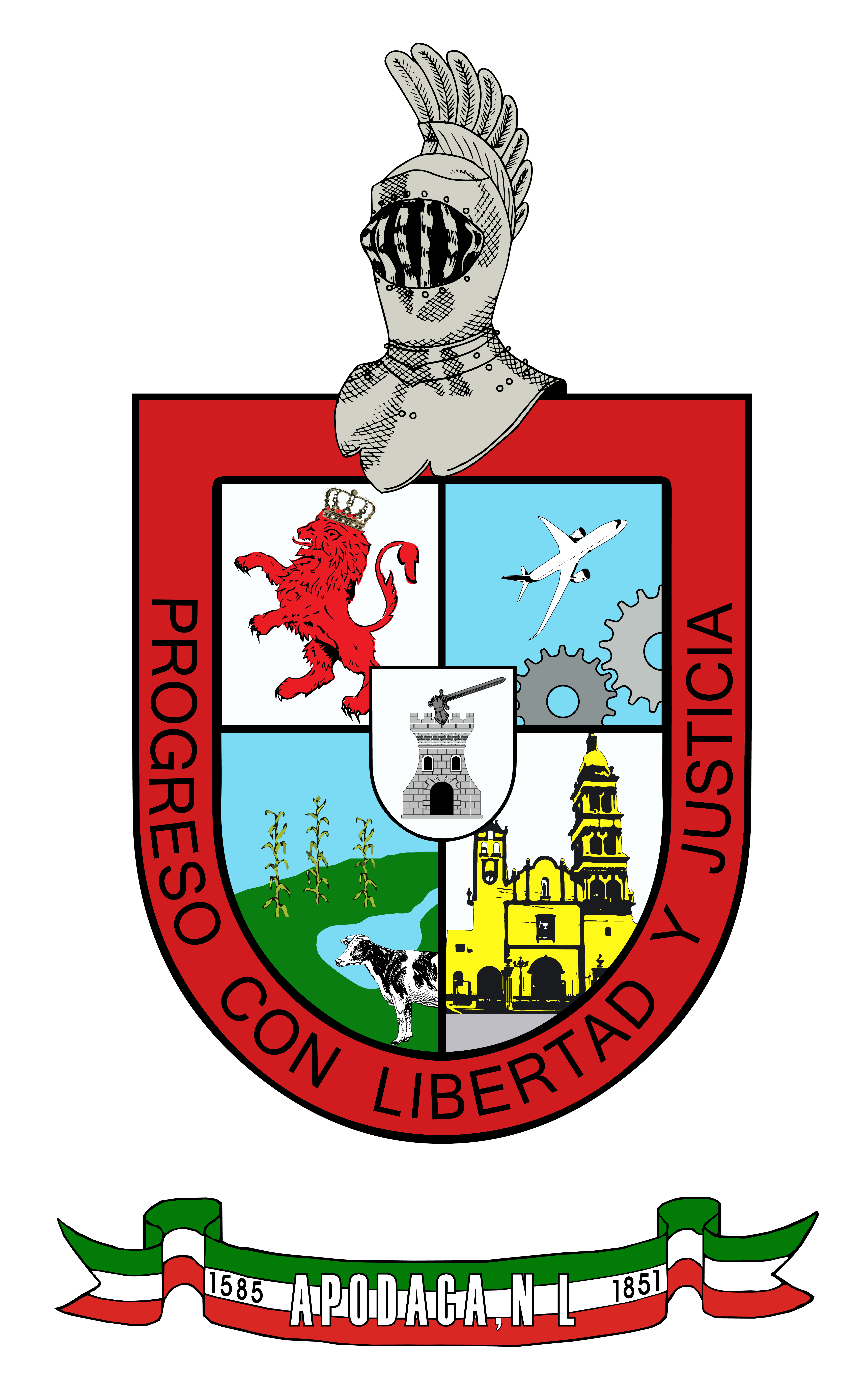 2958 x 4750 píxeles.